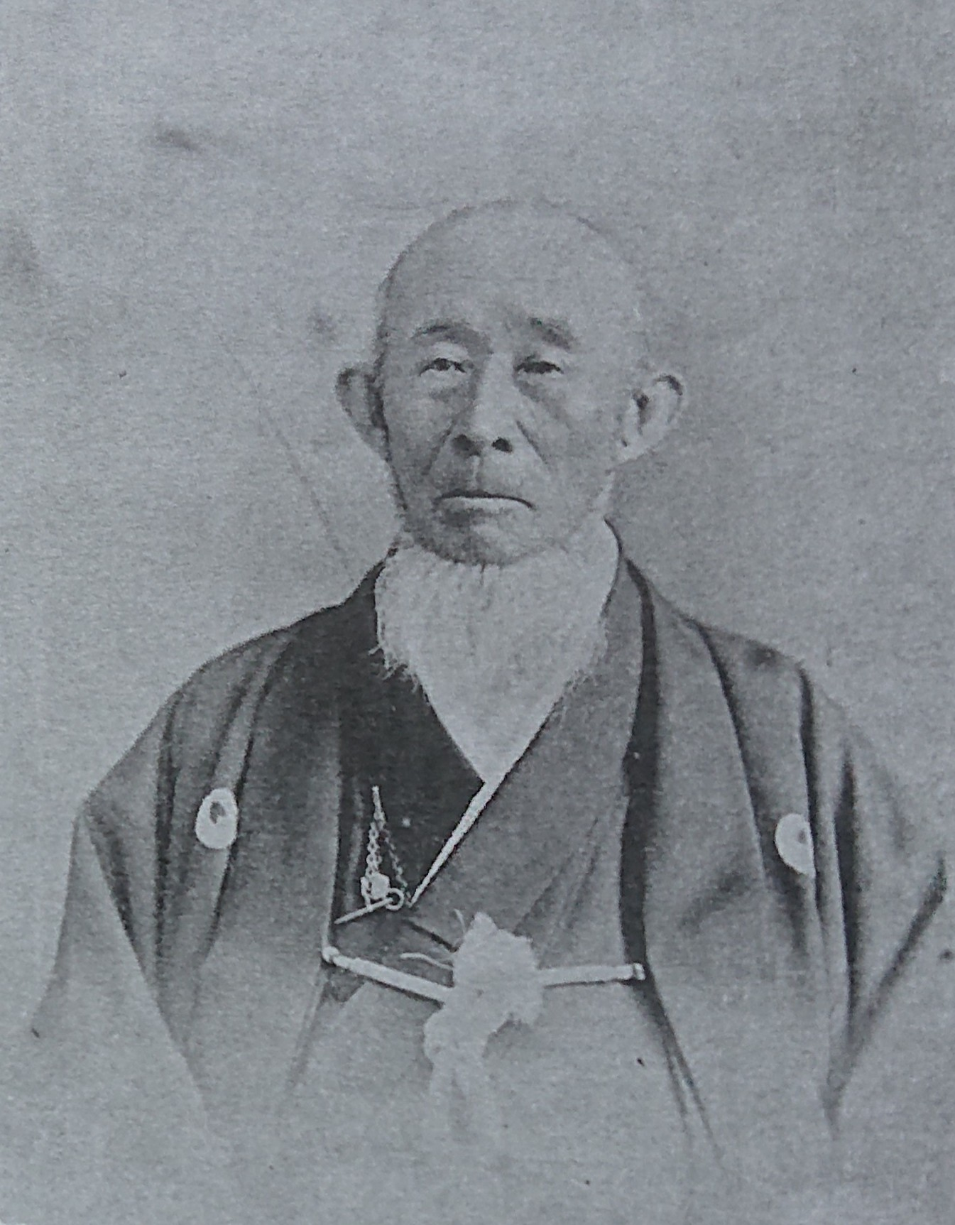 伊藤十蔵(伊藤博文父親)肖像写真